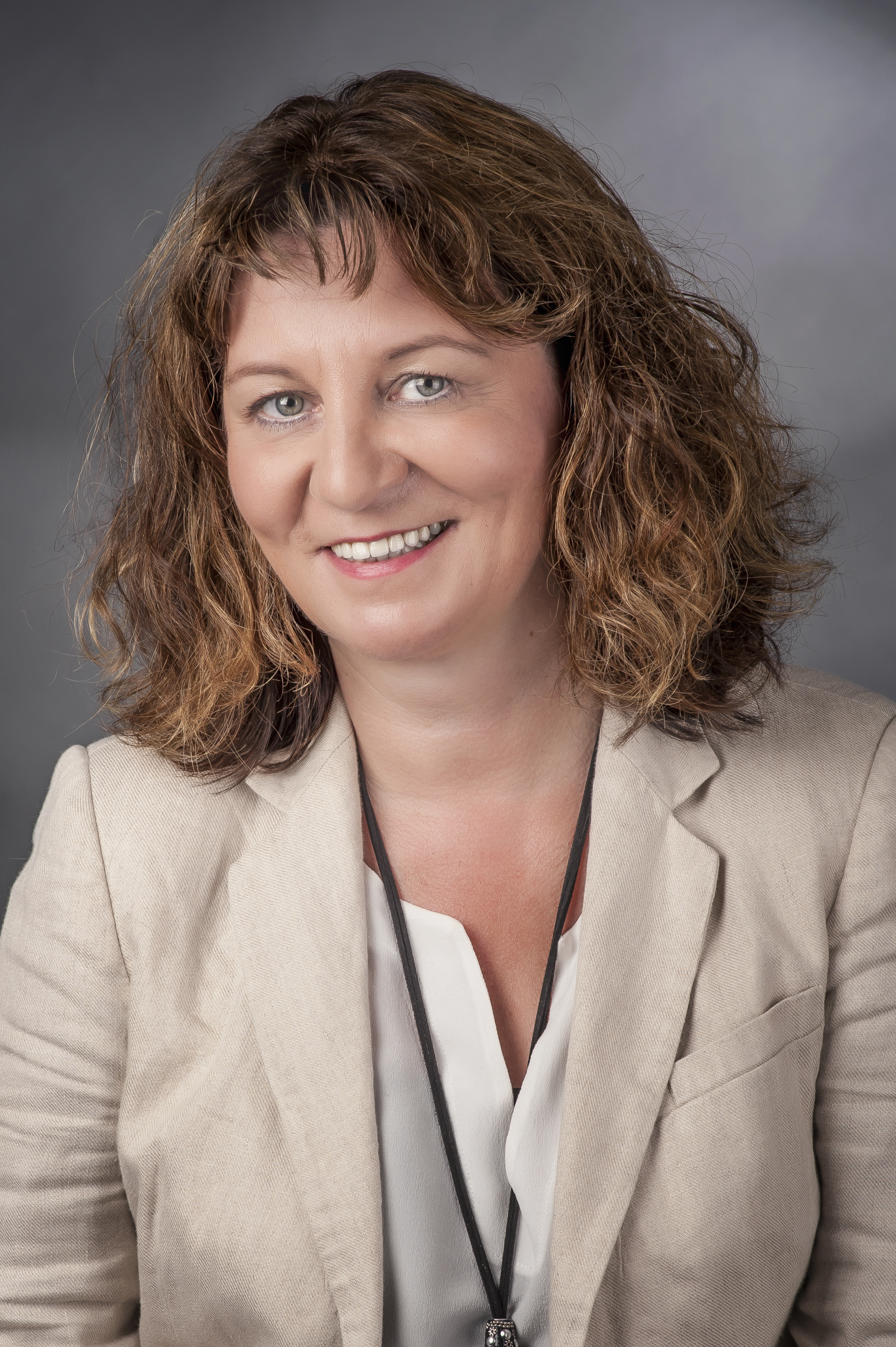 Martina Stamm-Fibich (* 23. April 1965 in Erlangen-Bruck) ist eine Politikerin (SPD). Sie gehört seit der 18. Legislaturperiode dem Deutschen Bundestag an.